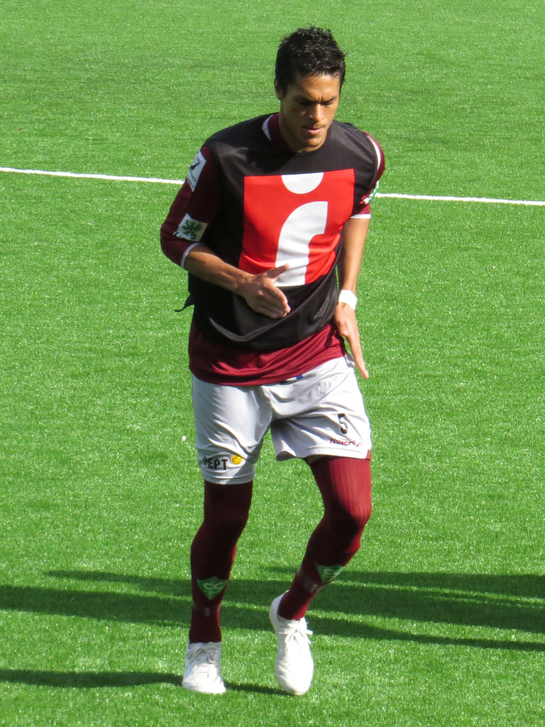 Reginaldo Manoel da Silva Junior (eli Reginaldo), brasilialainen jalkapalloilija FF Jaron joukkueessa kaudella 2015.